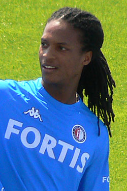 Serginho Greene (Feyenoord)